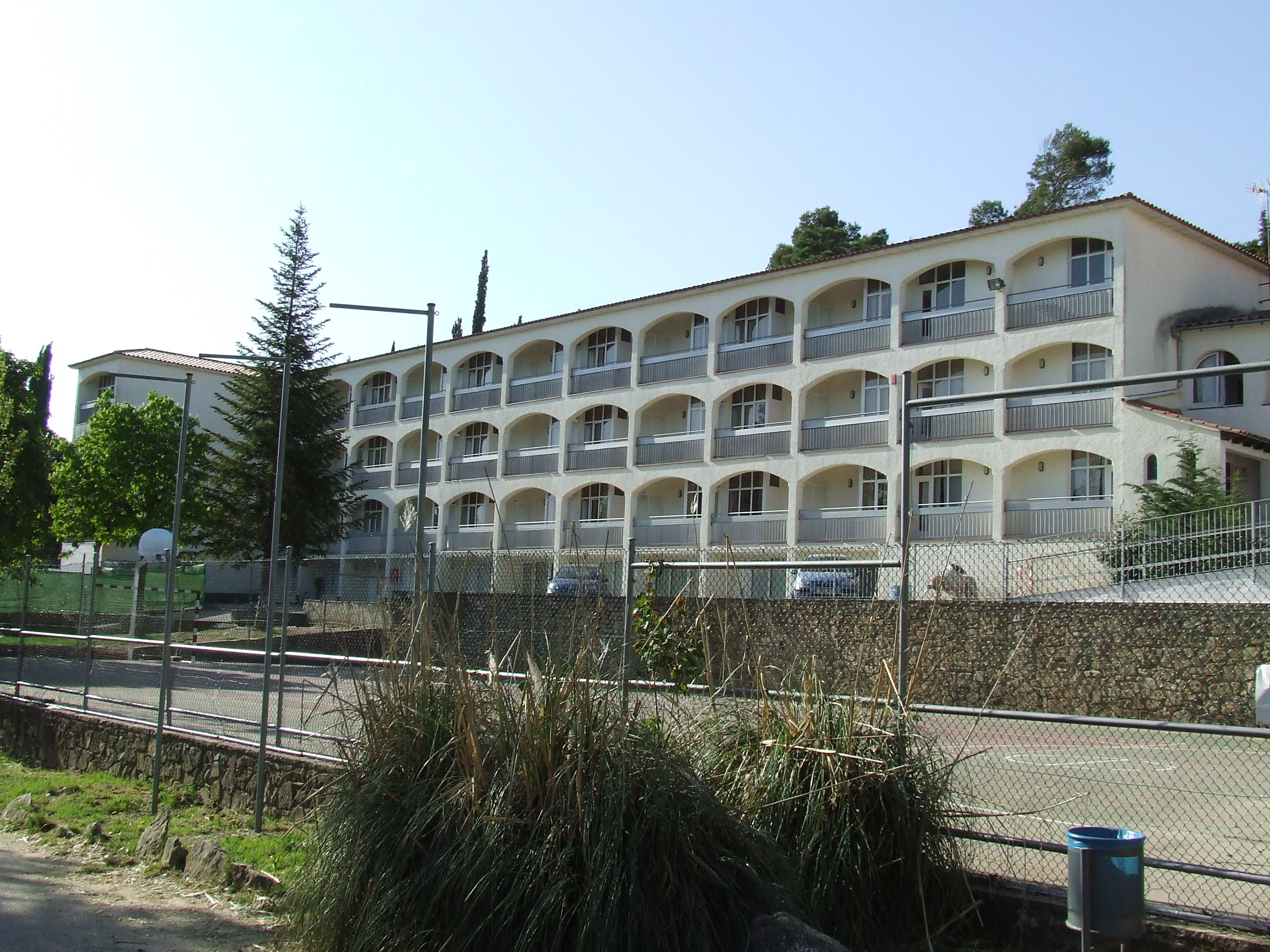 L'antic sanatori antituberculós de Mas Badó (Sant Quirze Safaja, Moianès)